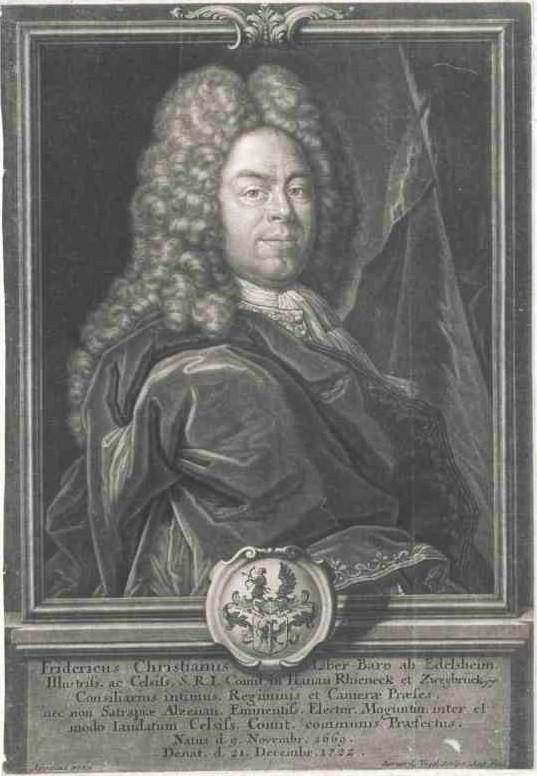 Friedrich Christian (Seifert) Freiherr von Edelsheim (* 9. November 1669 in Hanau; + am 21. Dezember 1722 in Hanau). Hanauischer Regierungspräsident, war seit 1694 verheiratet mit Clara Elisabeth Magdalene Rau von Holzhausen. Der Jurist, Hanauer Staatsmann und Diplomat war Geheimer Rat, Regierungs- und Kammerpräsident sowie gelegentlicher Dichter von Gesangbuchliedern.